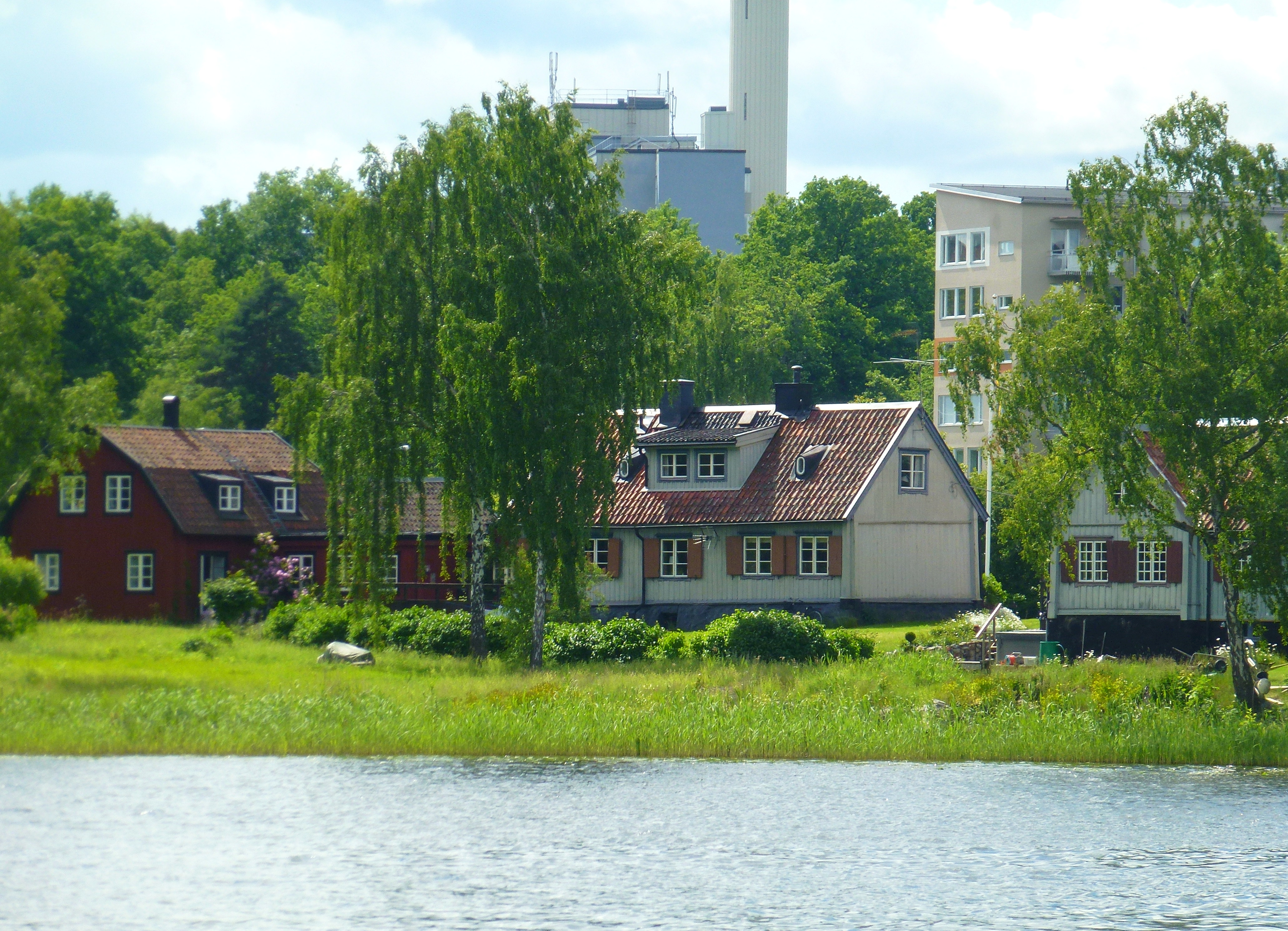 Hökarängens gård, vy över Dreviken